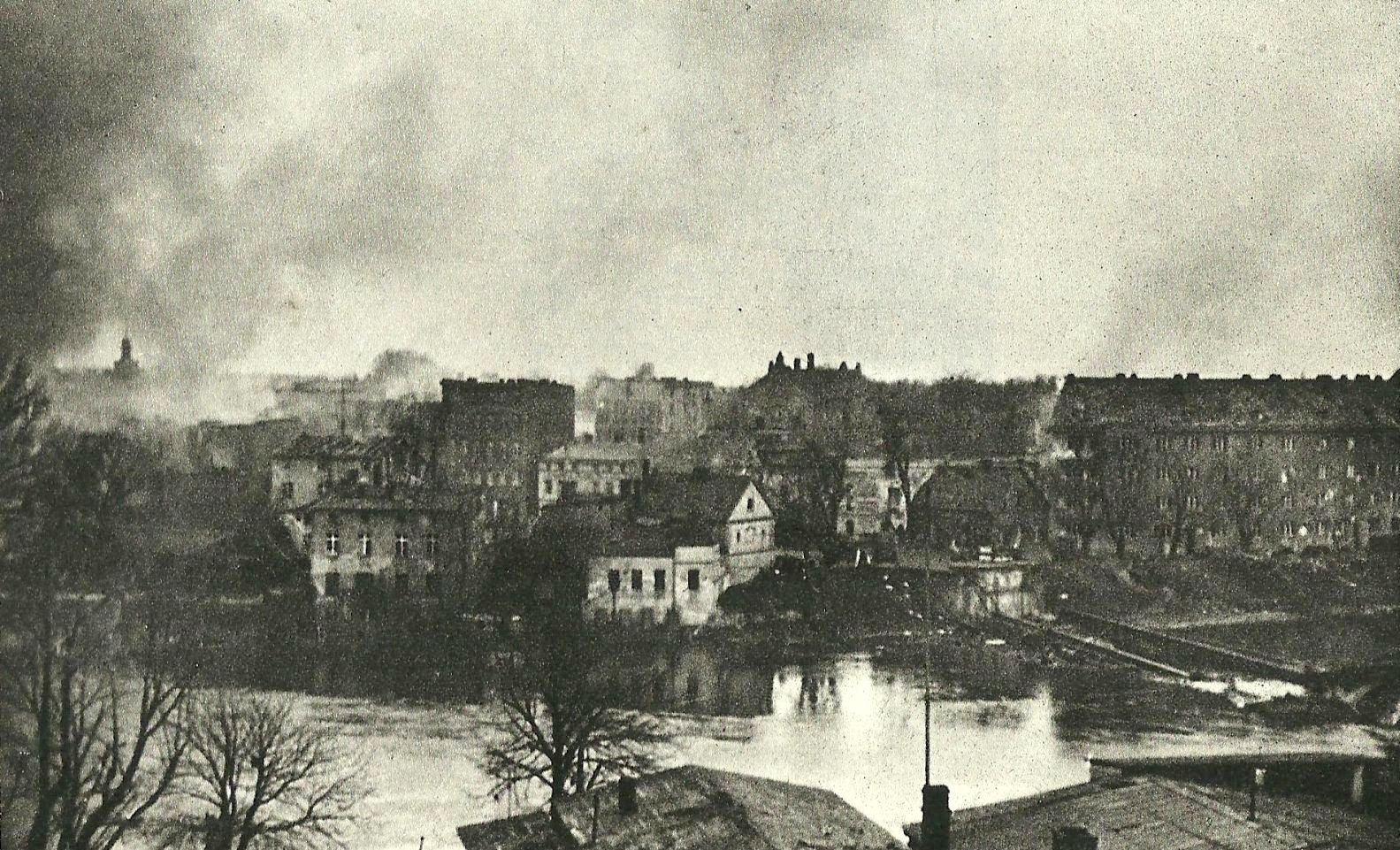 Powojenna panorama Zaodrza. Większość budynków widocznych na zdjęciu nie istnieje, część zastąpiono plombami. Na zdjęciu widać zerwany Most Stulecia.